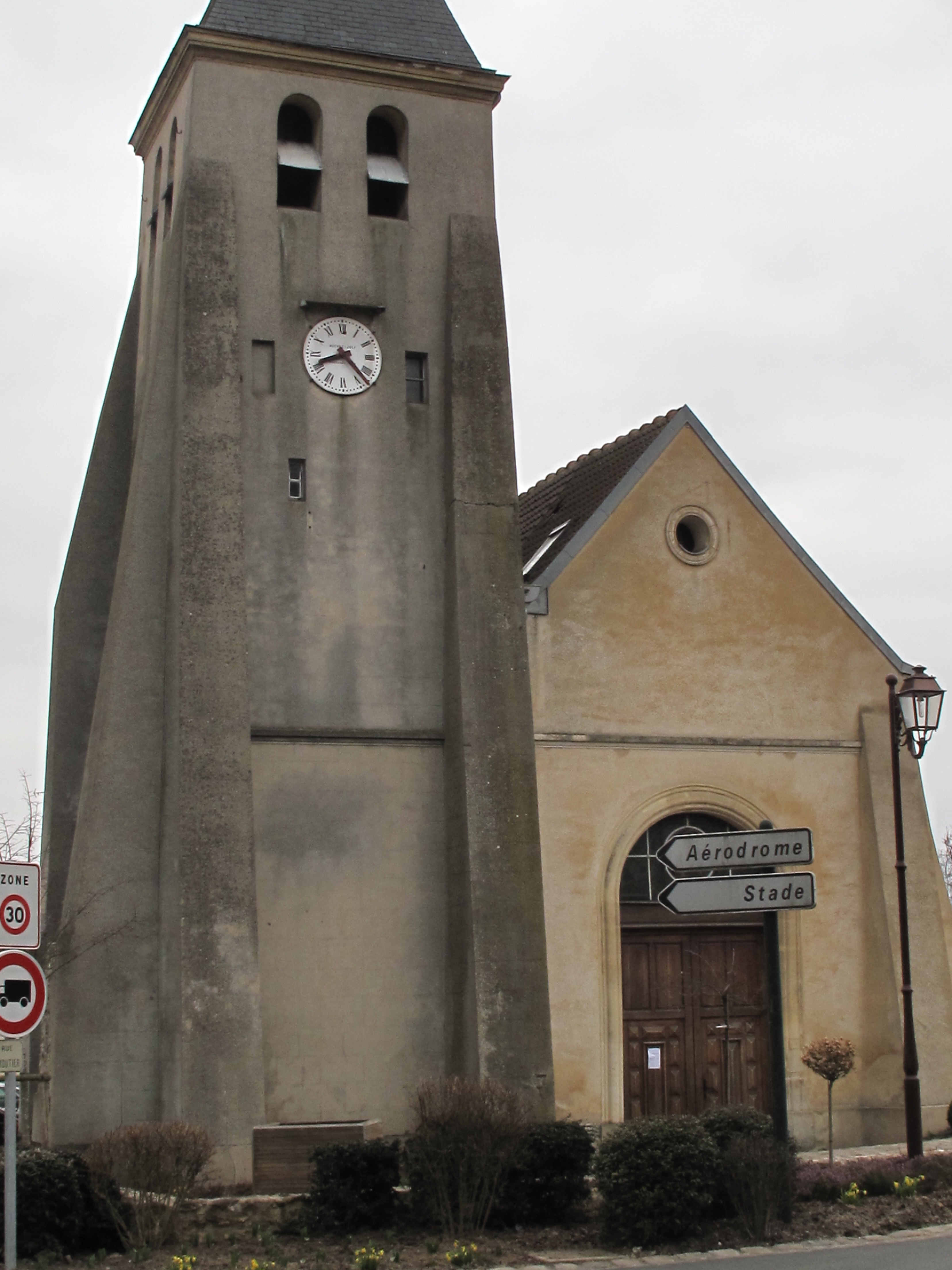 Église Saint-Maclou de Moisselles.